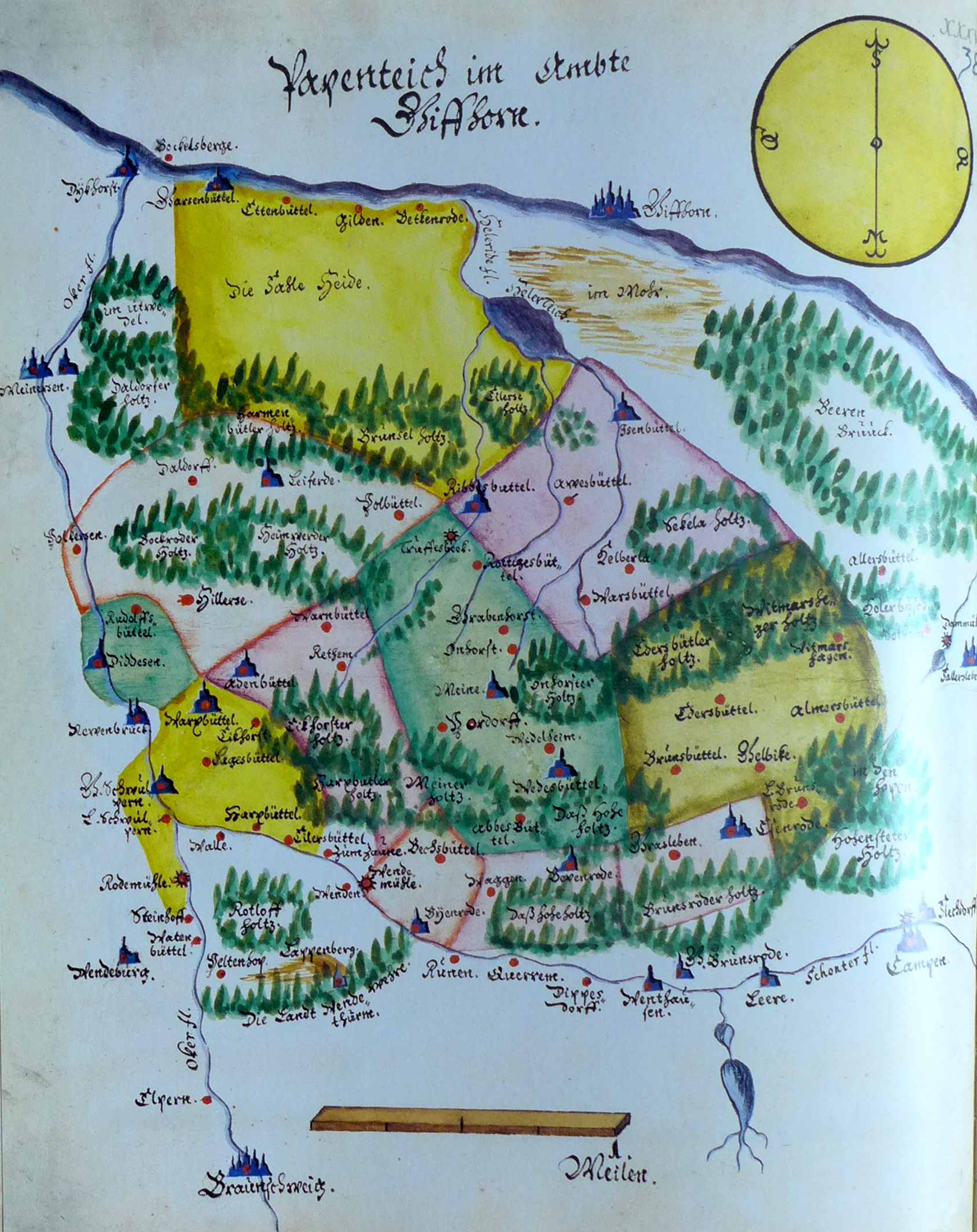 Ämteratlas des Fürstentums Lüneburg von Johannes Mellinger, um 1600 – Reproduktion der im Niedersächsischen Landesarchiv, Abteilung Hannover, lagernden Kopie um 1678 (vgl.